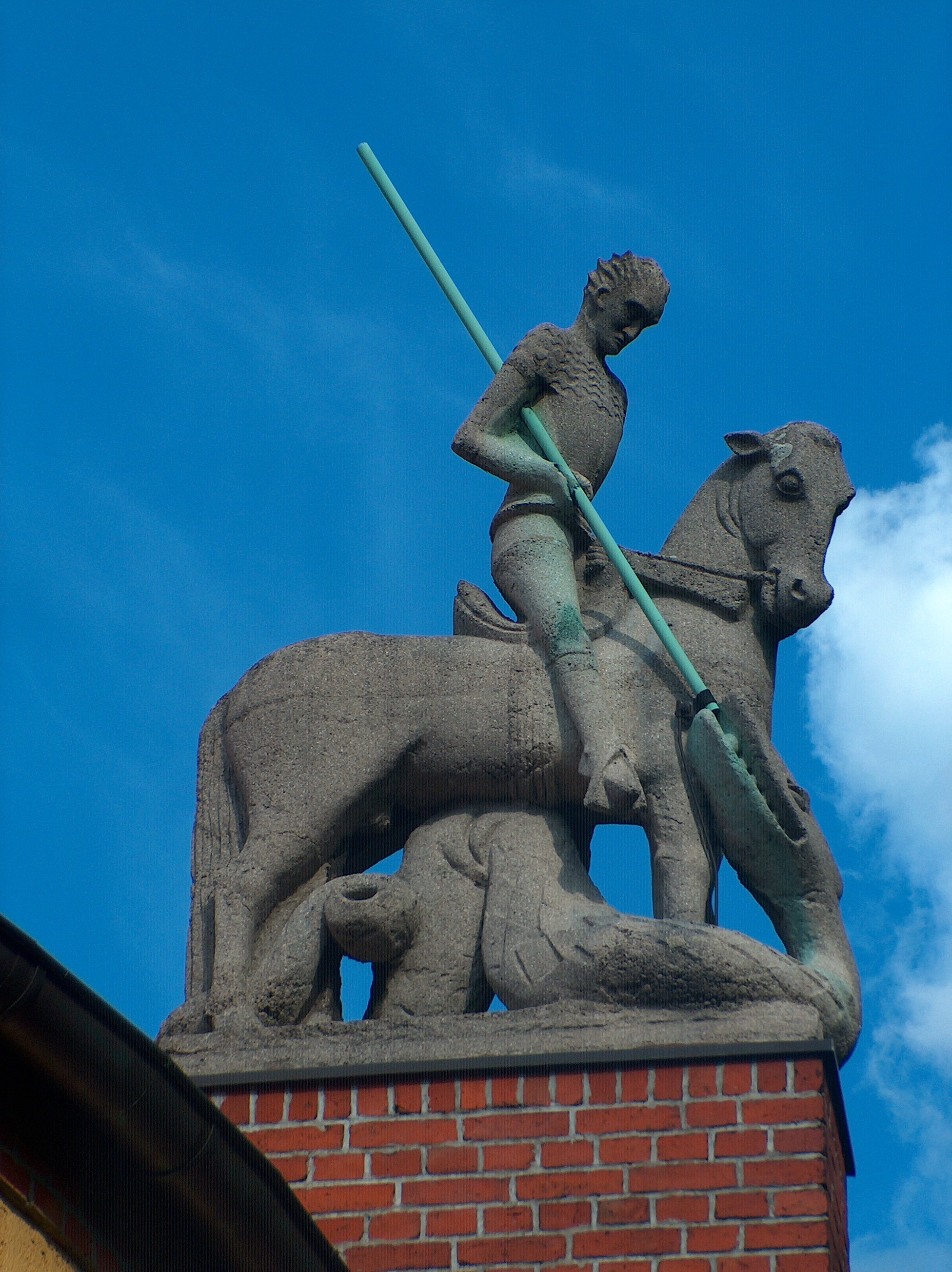 St. Antonius Potsdam-Babelsberg, St. Georgs-Figur von Otto Hitzberger auf dem Pfeiler der Apsis